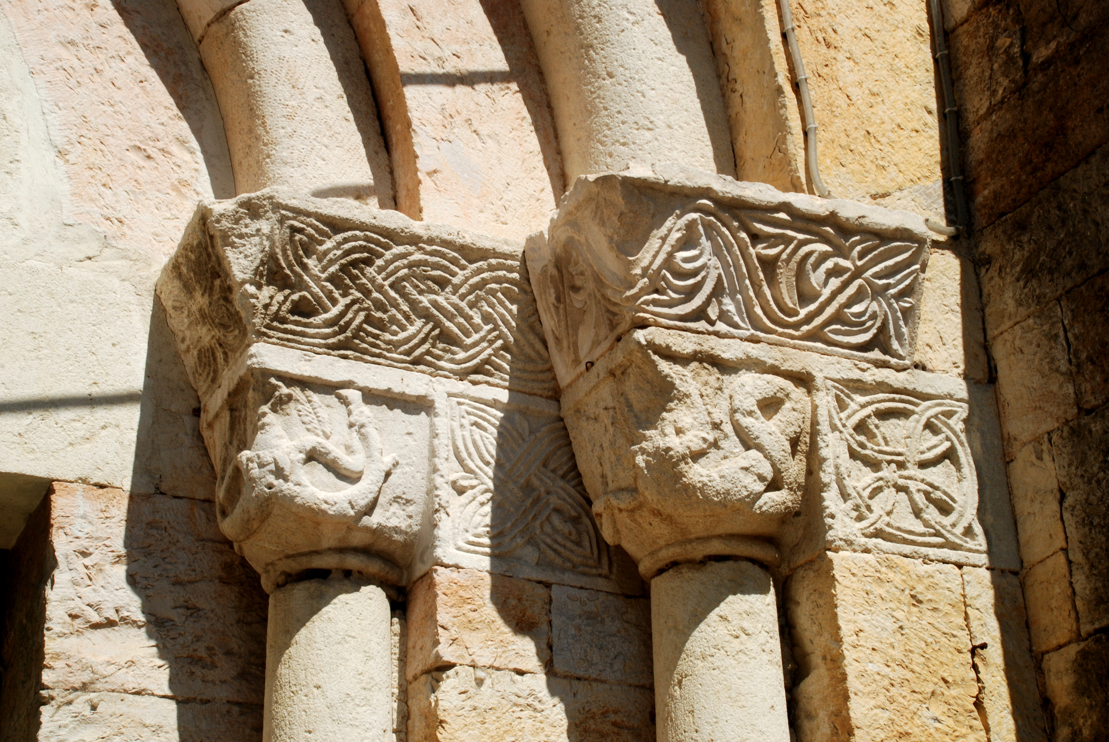 France - Gard - Église Saint-André de Bernis